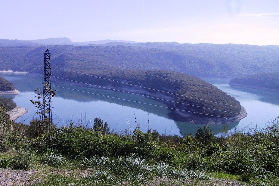 Stauséi Vouglans.